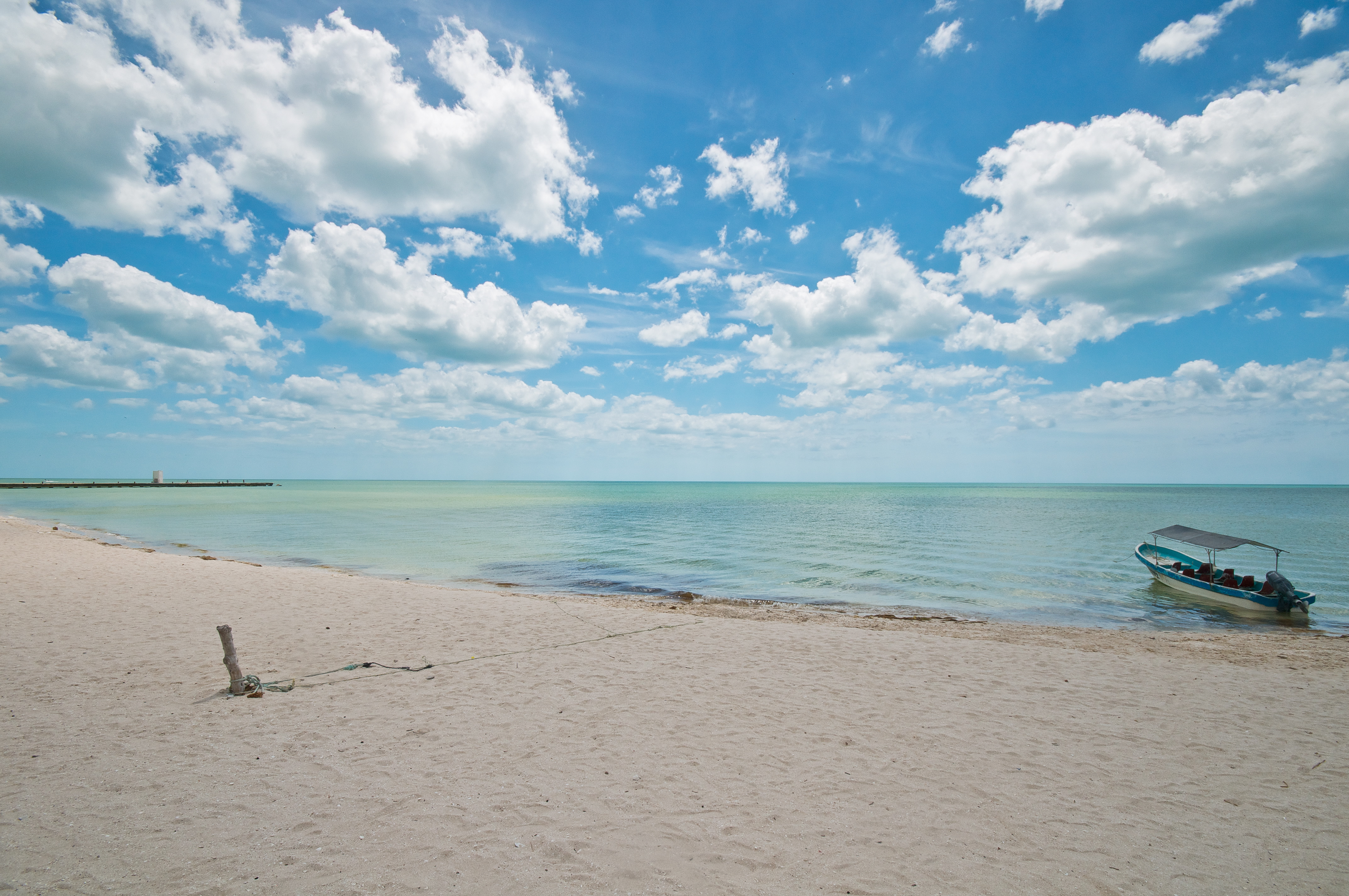 Celestun, Yucatan, Mexique. Eté 2011.